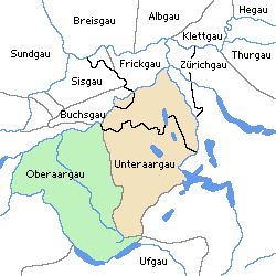 Der Aargau im 10. Jahrhundert selbst erstellt durch Voyager